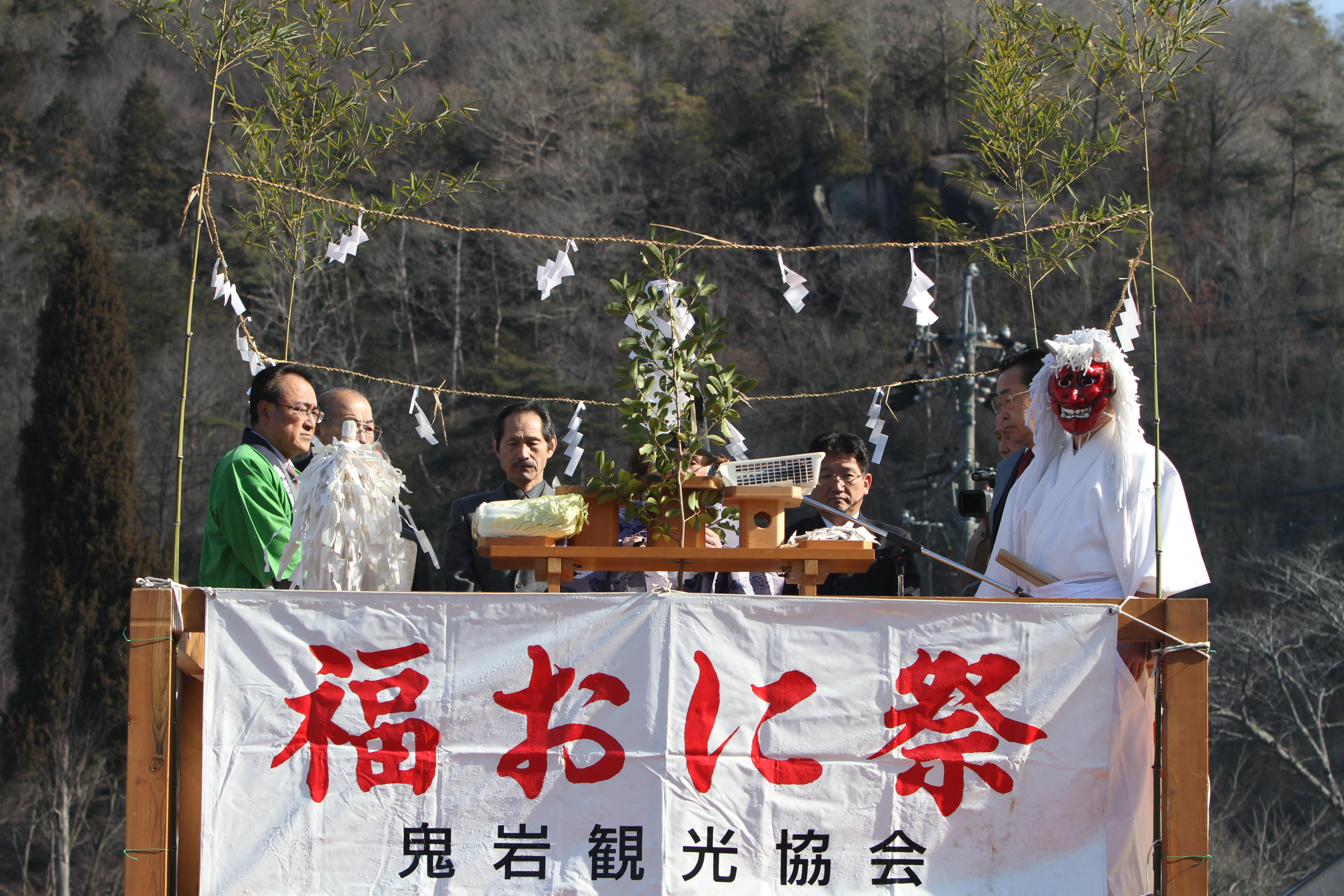 鬼岩福おに祭 (岐阜県瑞浪市日吉町)